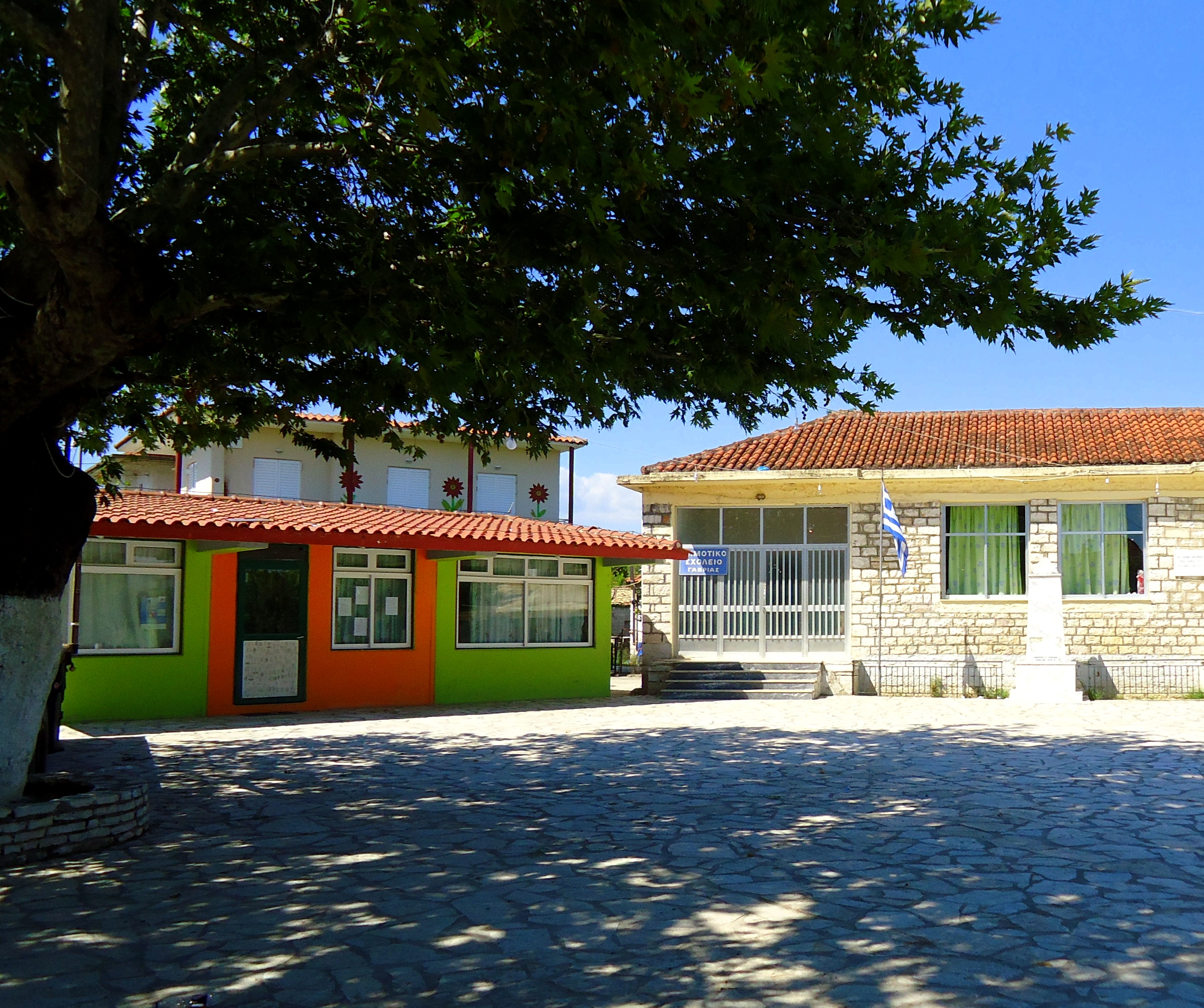 Το δημοτικό και το νηπιαγωγείο της Γαβριάς.